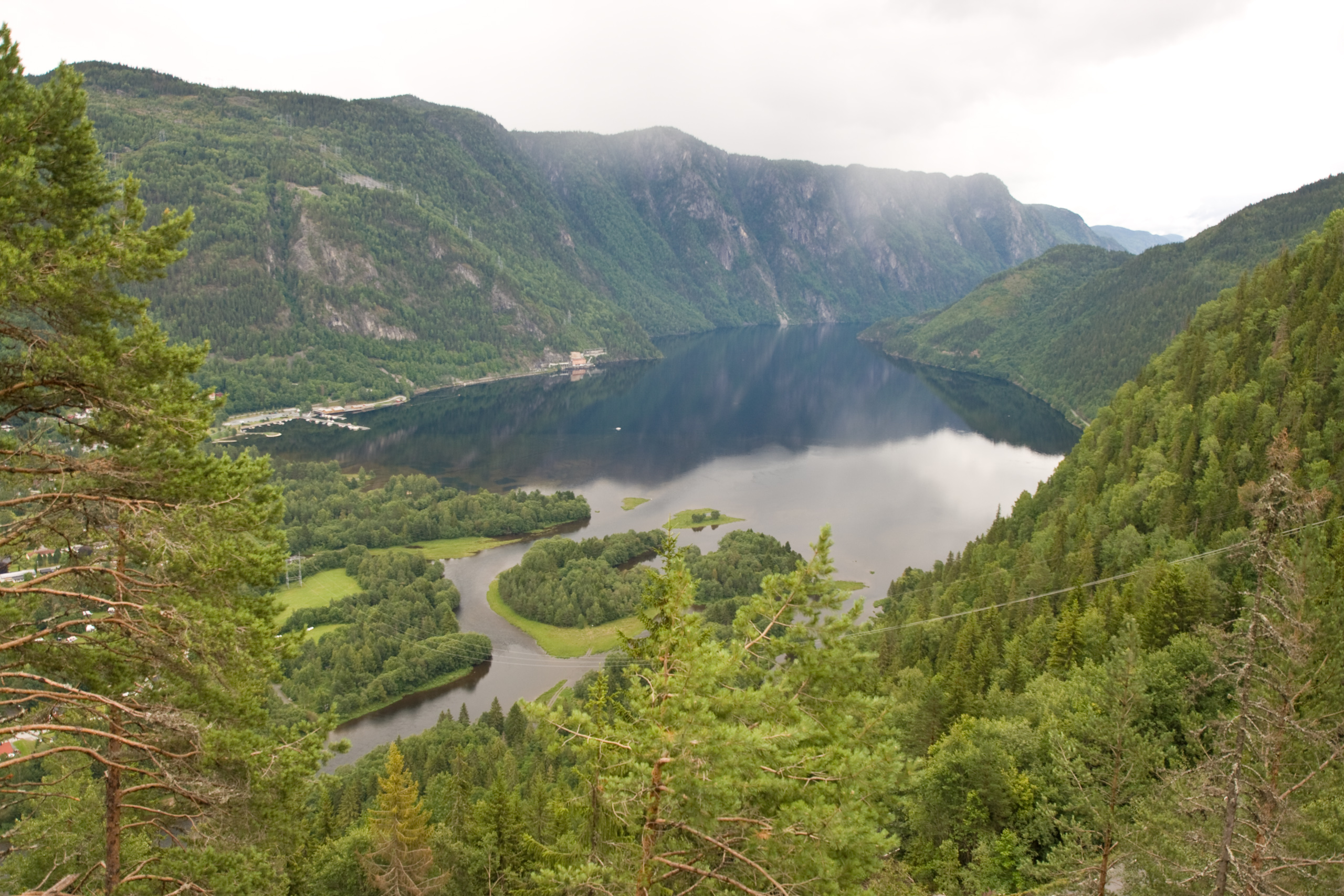 Bandak sett frå Riksveg 45. Dalen bak trea til venstre.